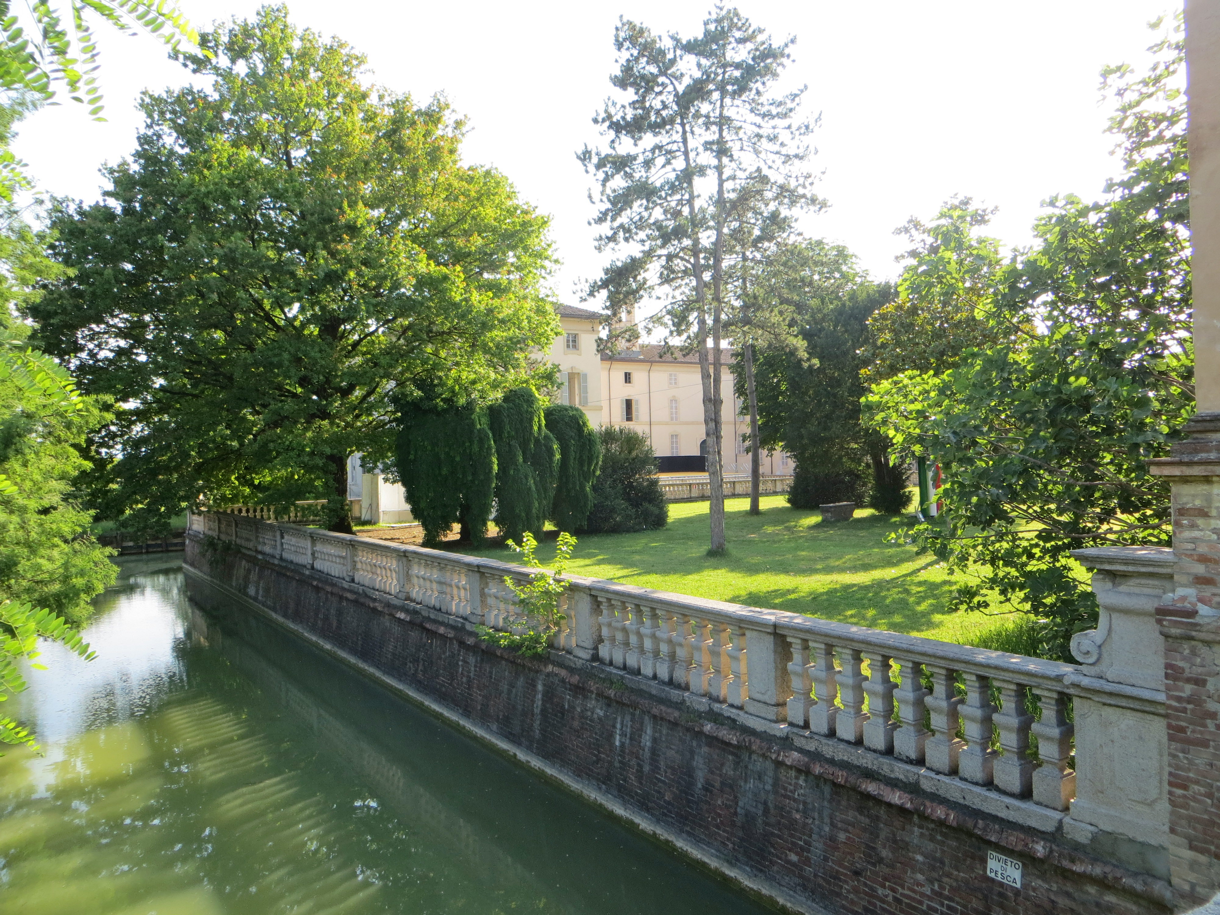 Villa Pallavicino (Busseto) - peschiera This is a photo of a monument which is part of cultural heritage of Italy.